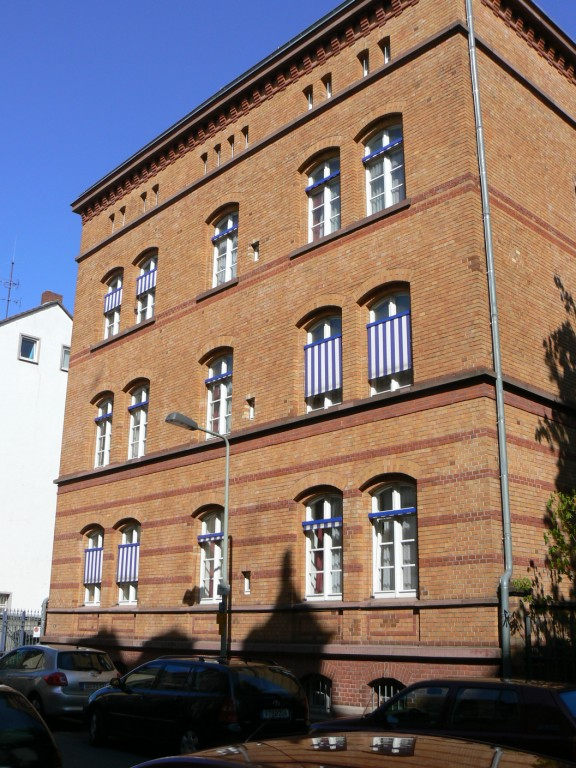 ehemalige kaiserliche Armee-Lehrschmiede, Kiesstraße, Ffm-Bockenheim